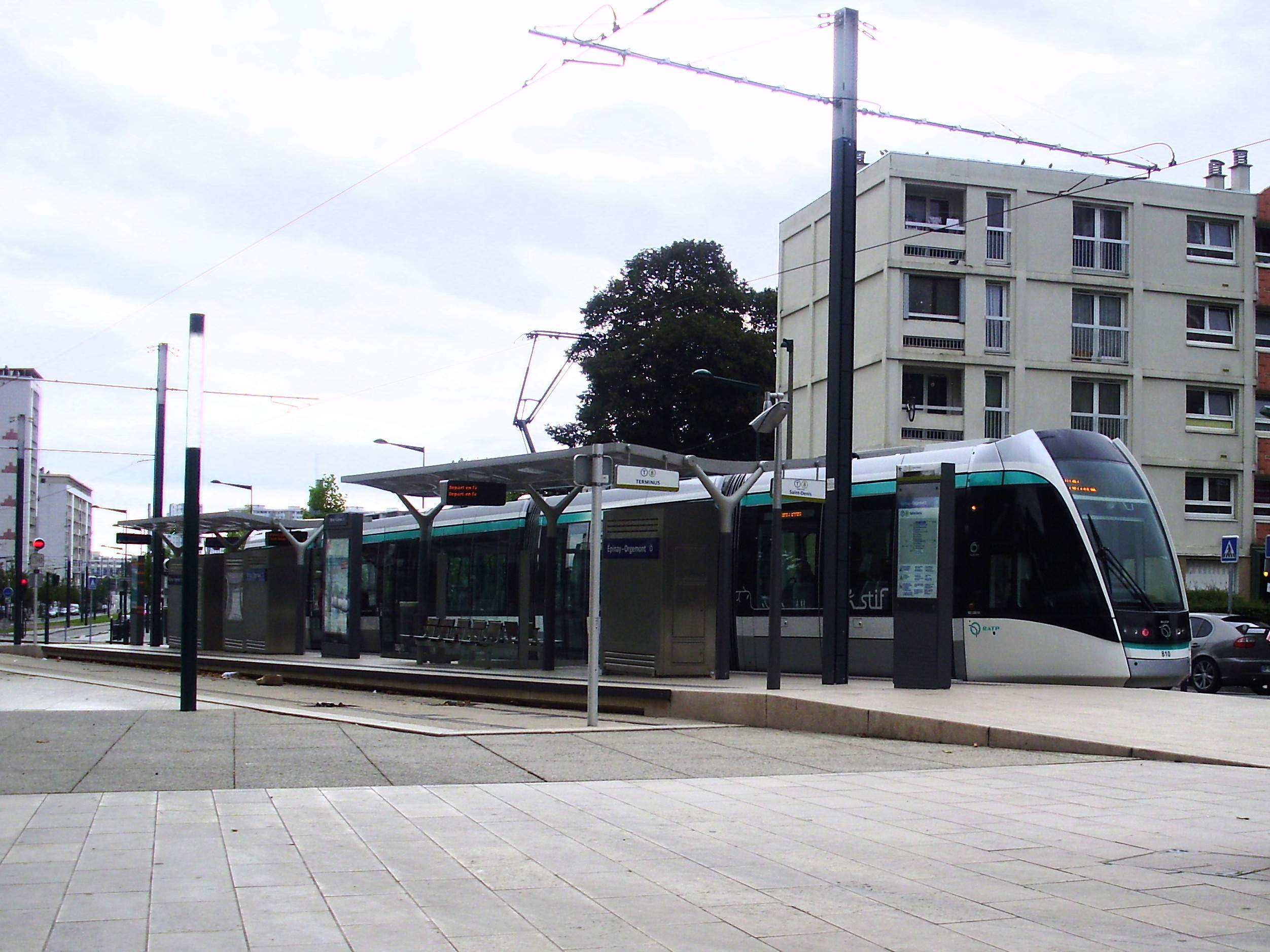 Station Épinay-Orgemont de la ligne T8 du tramway d'Île-de-France, rue Félix-Merlin, Épinay-sur-Seine, France.